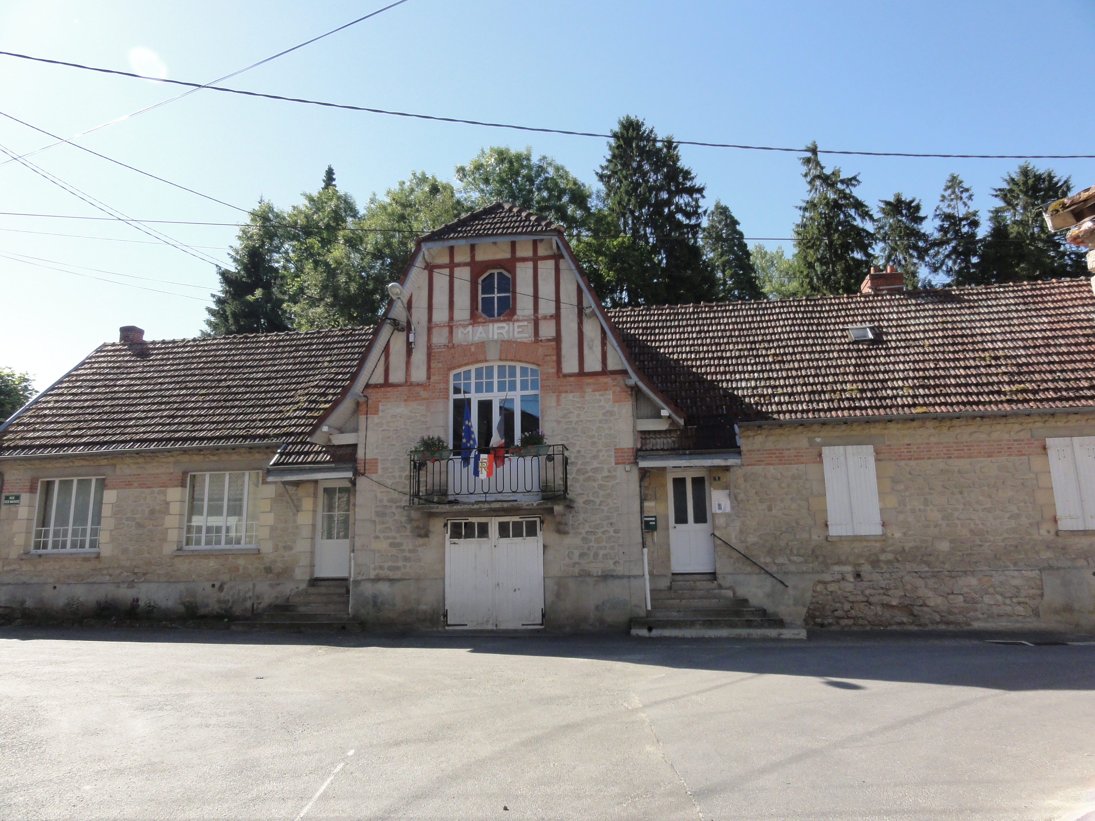 Meurival (Aisne) mairie